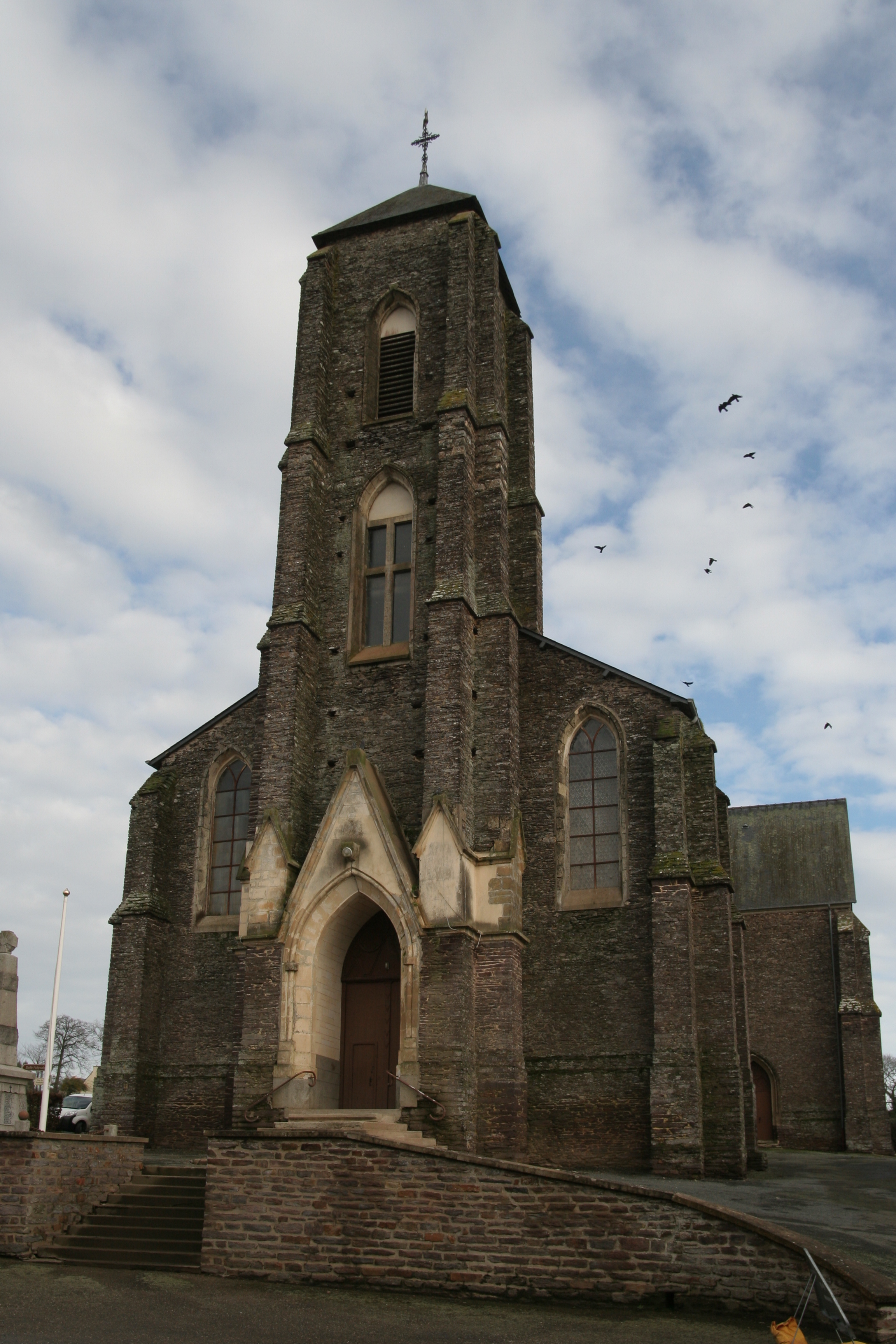 Église Sainte-Marie-Madeleine de Campel.